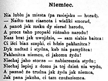 Беларуская (тарашкевіца): Ф. Багушэвіч, «Немец» (уступ)